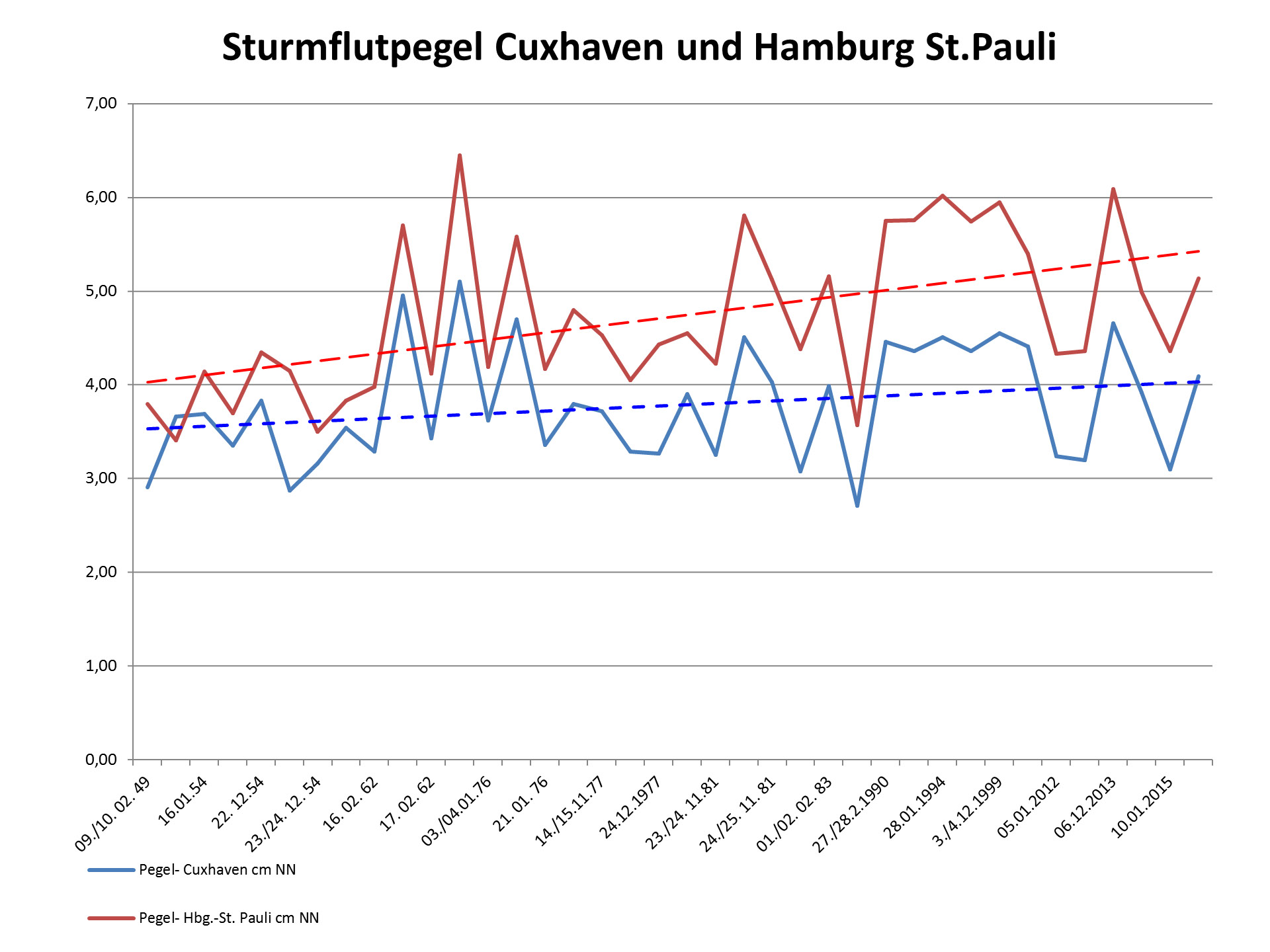 Sturmflutpegel Cuxhaven und HH-St Pauli 65 Jahre